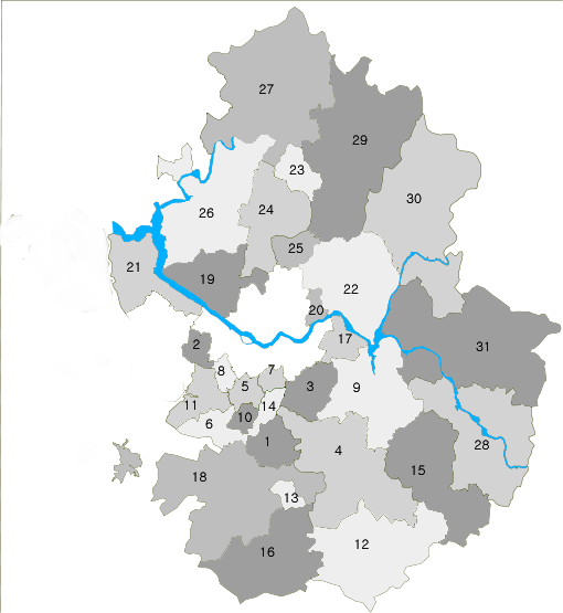 경기도의 행정구역